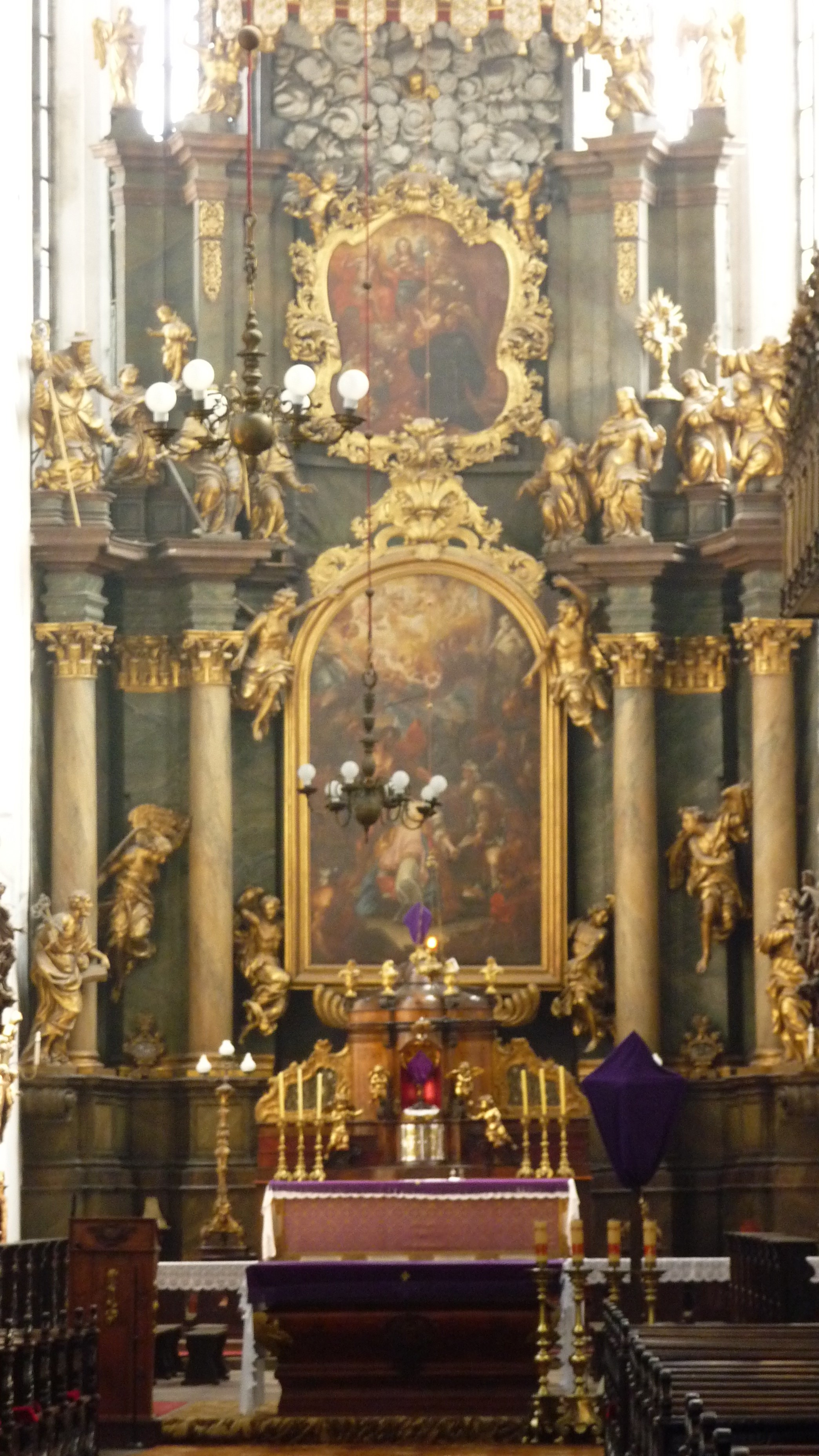 Ołtarz główny z ok. 1720 r. z obrazem „Męczeństwo św. Doroty”.